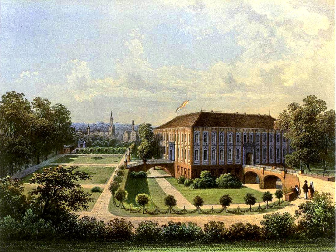 Schloss Sagan, Kreis Sprottau, Provinz Schlesien, Lithografie aus dem 19. Jahrhundert